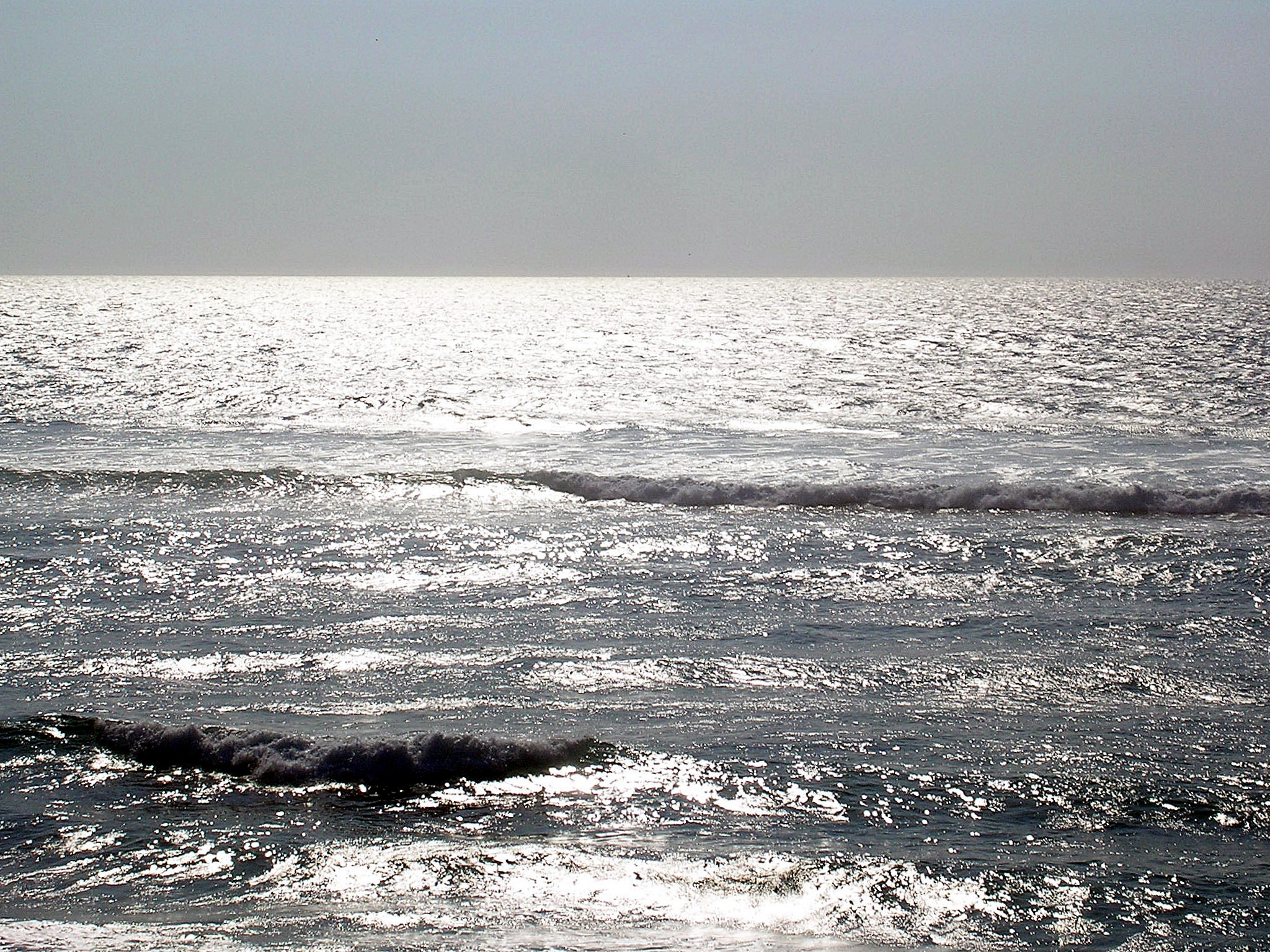 Vue des reflets argentés sur l'Océan Atlantique à Mimizan (Landes, France)